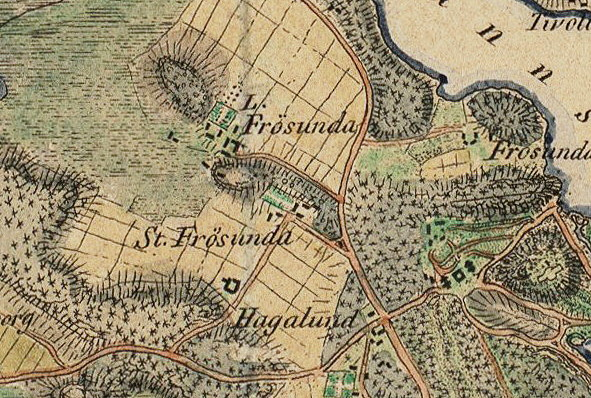 Stora och Lilla Frösunda på "Karta över belägenheten omkring Stockholm"